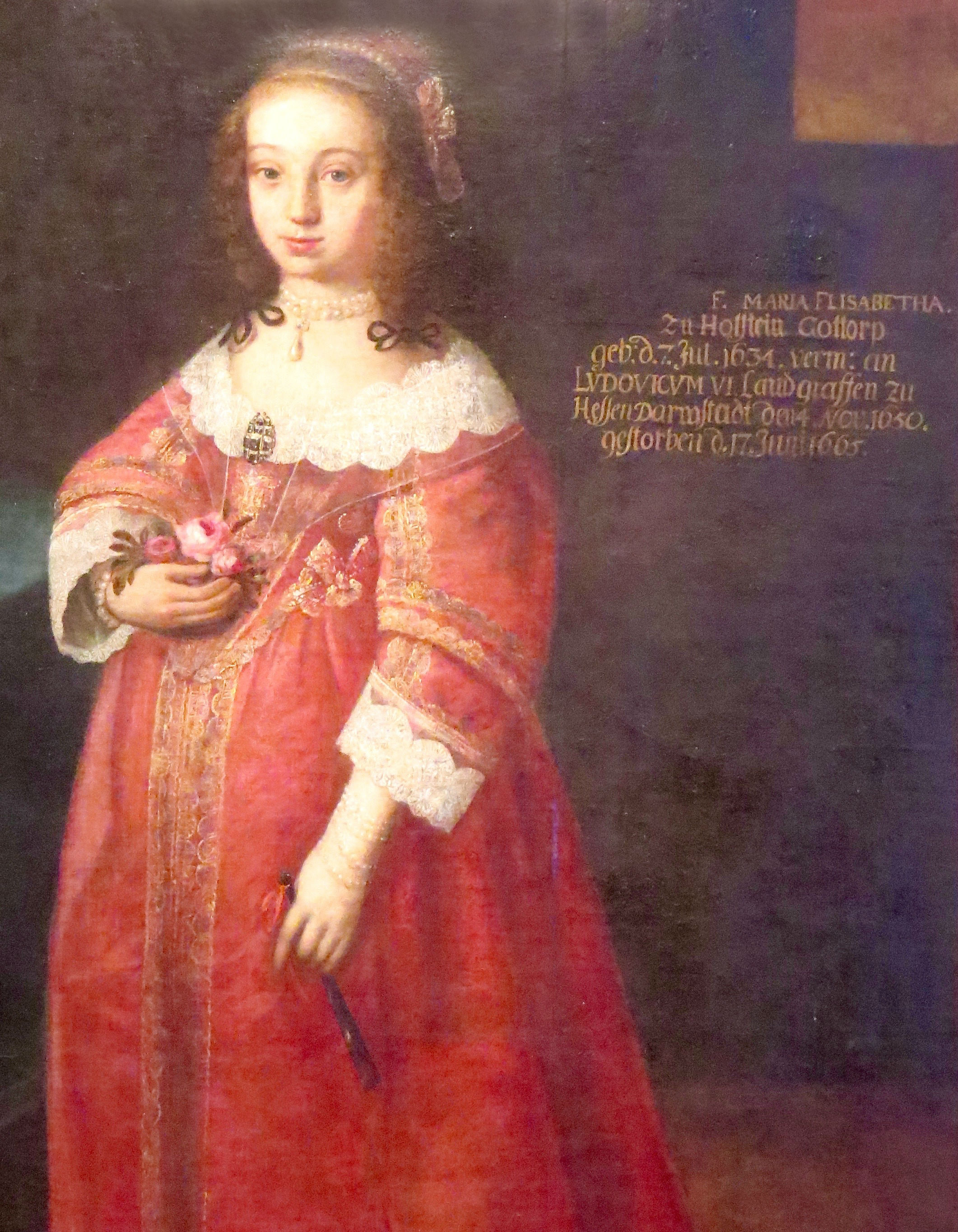 Marie Elisabeth af Slesvig-Holsten-Gottorp (1634-1665), udsnit af maleri af Julius Strachen, Gottorp Slot, Sydslesvig